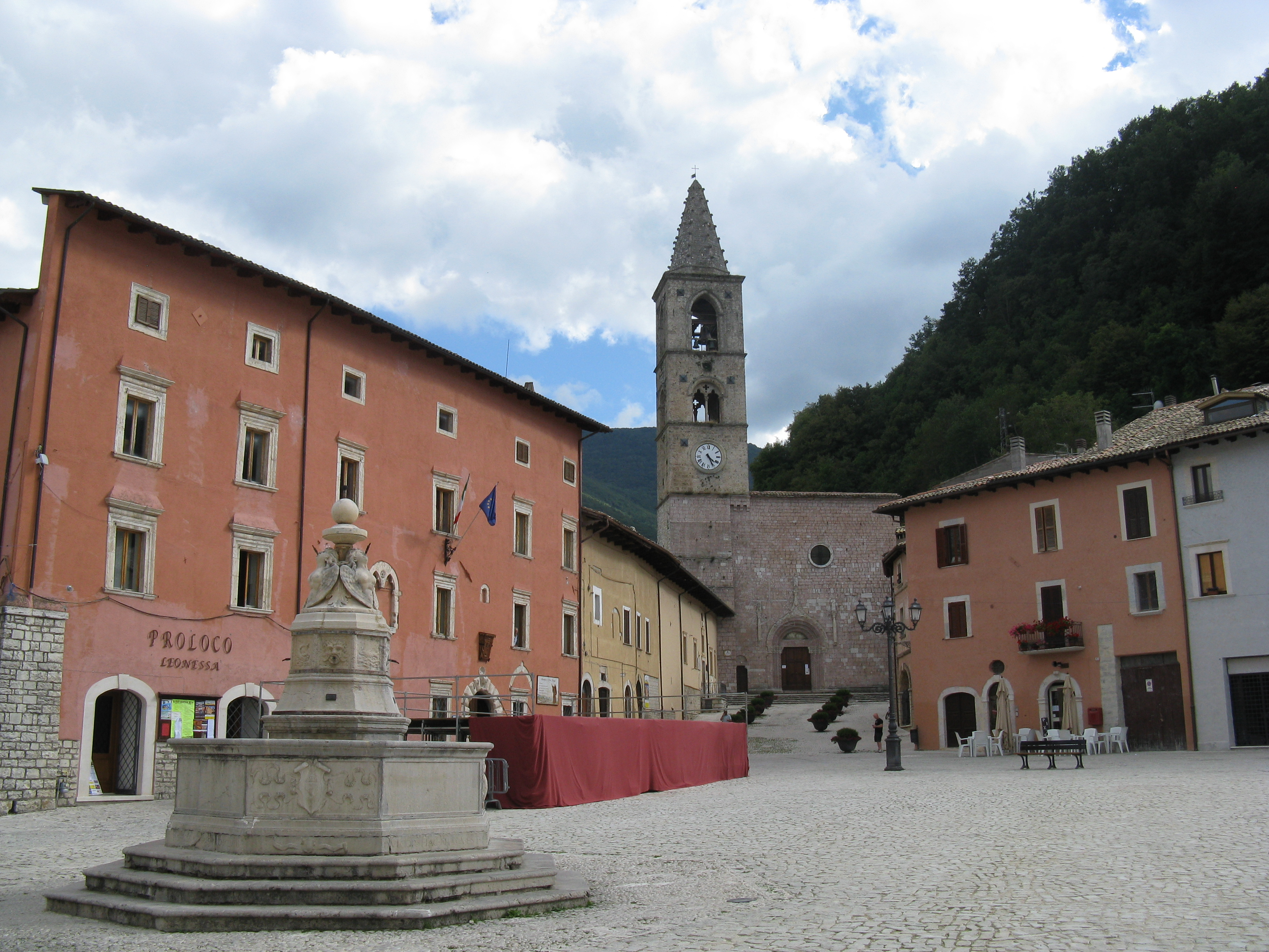 Leonessa_Piazza_VII_Aprile